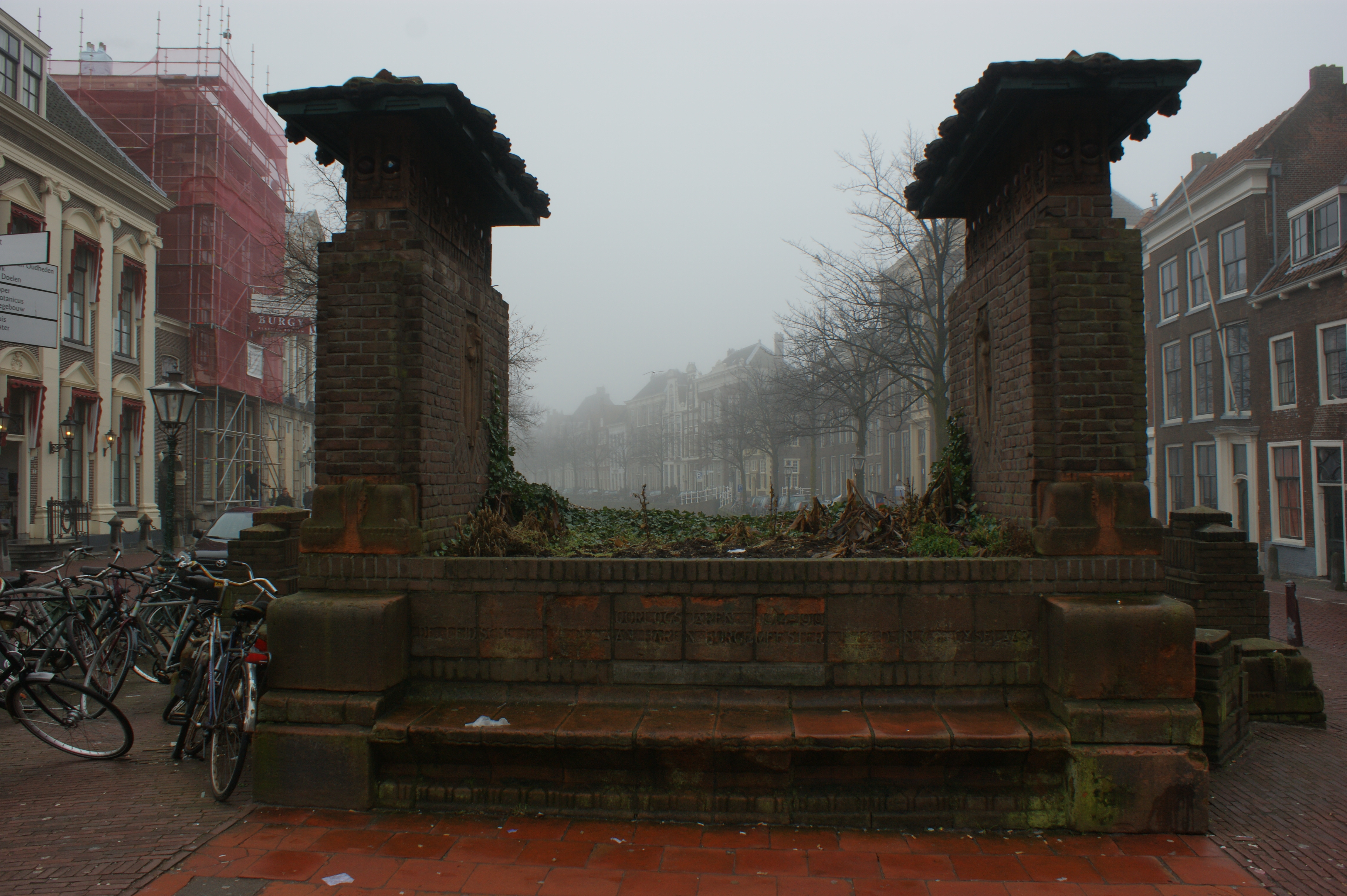 Leiden - Leiden - Stenen bankje (Rapenburg, hoek Breestraat, Noordeinde, Kort Rapenburg. Architect W.C. Brouwer. Bank neergezet in 1920 ter ere van burgemeester jhr. N.C. de Gijselaar. Ook wel Gijselaarsbank of werklozenbank genoemd)